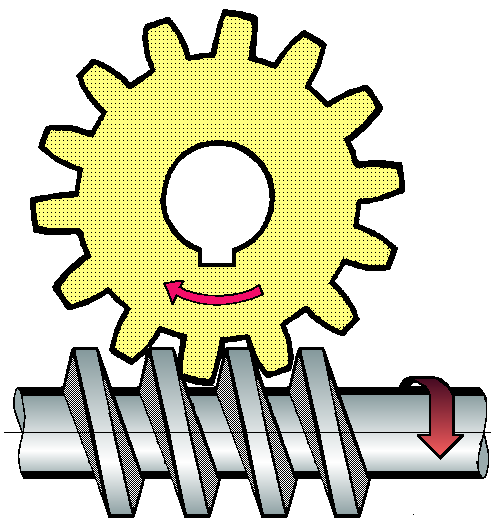 Vis sans fin. réalisation perso. Domaine public